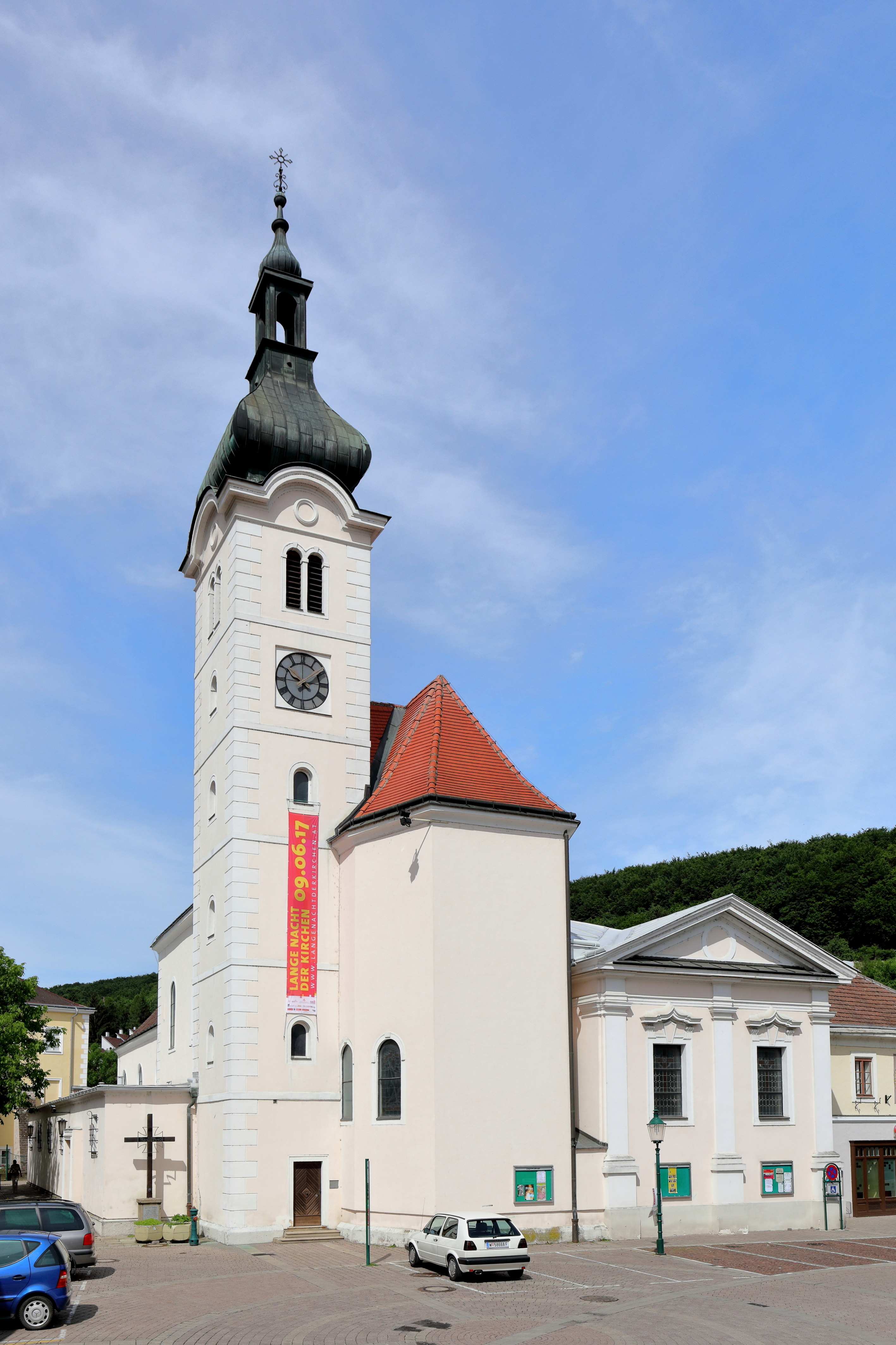 Ostansicht der röm.-kath. Pfarrkirche hl. Jakobus der Ältere in der niederösterreichischen Stadtgemeinde Purkersdorf.Eine im Kern gotische barockisierte Saalkirche mit eingezogenem Dreiseitenchor und hohem Turm im südlichen Chorwinkel. Die vorhandene Kapelle (heutiger Chor) wird bei der Ersten Wiener Türkenbelagerung schwer beschädigt und später wird diese zu einer Kirche um- und ausgebaut. Nach der Zerstörung bei der Zweiten Wiener Türkenbelagerung erfolgt die Wiederinstandsetzung im barocken Stil. 1726 wurde nordseitig eine Sakristei und eine Taufkapelle (heute Wochentagskapelle) angebaut. Eine weitere Erweiterung fand 1935/36 statt, indem nach Plänen von Karl Holey südseitig ein niedriges Seitenschiff angebaut wurde und man das Langhaus Richtung Westen verlängerte, das mit einem halbrunden Eingangsbereich abschließt.